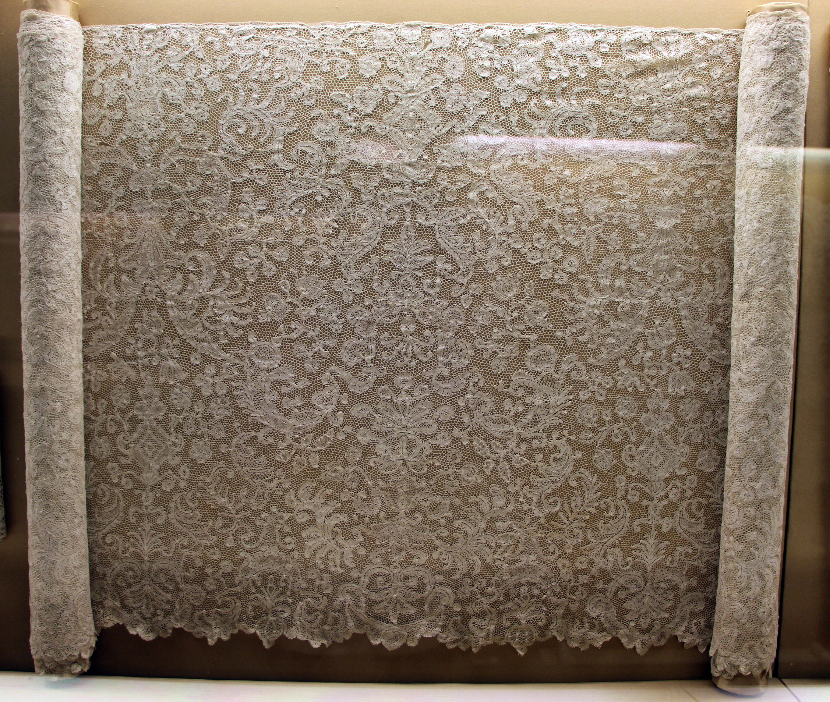 Museo della Casa fiorentina Antica - Palazzo Davanzati - MIBAC The making of this document was supported by Wikimedia CH. (Submit your project!) For all the files concerned, please see the category Supported by Wikimedia CH. This is a photo of a monument which is part of cultural heritage of Italy.